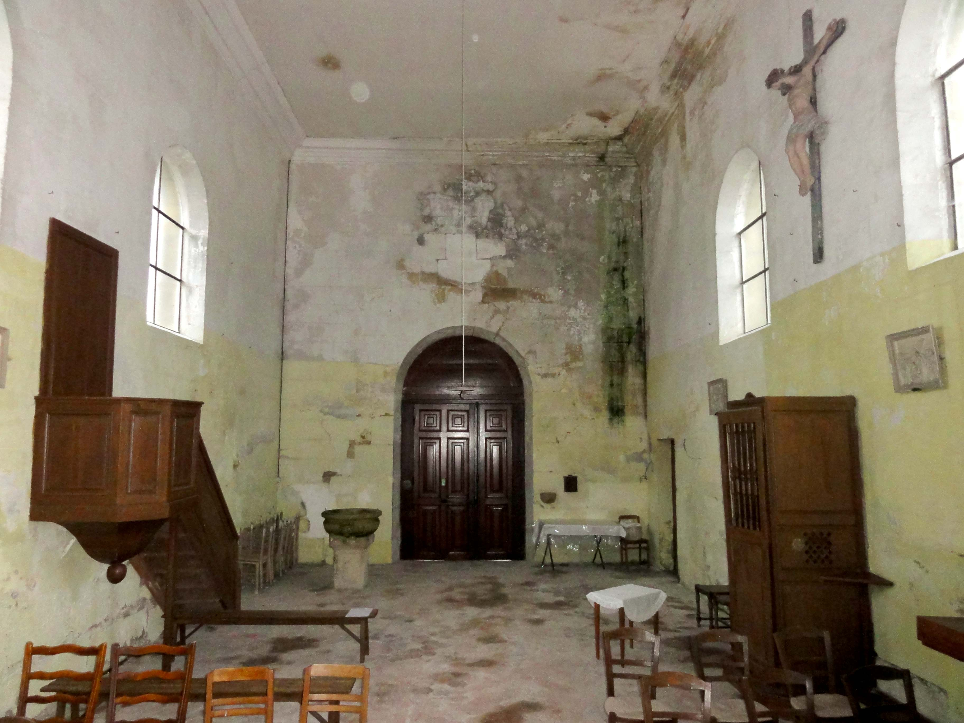 Intérieur de l'église - voir titre.